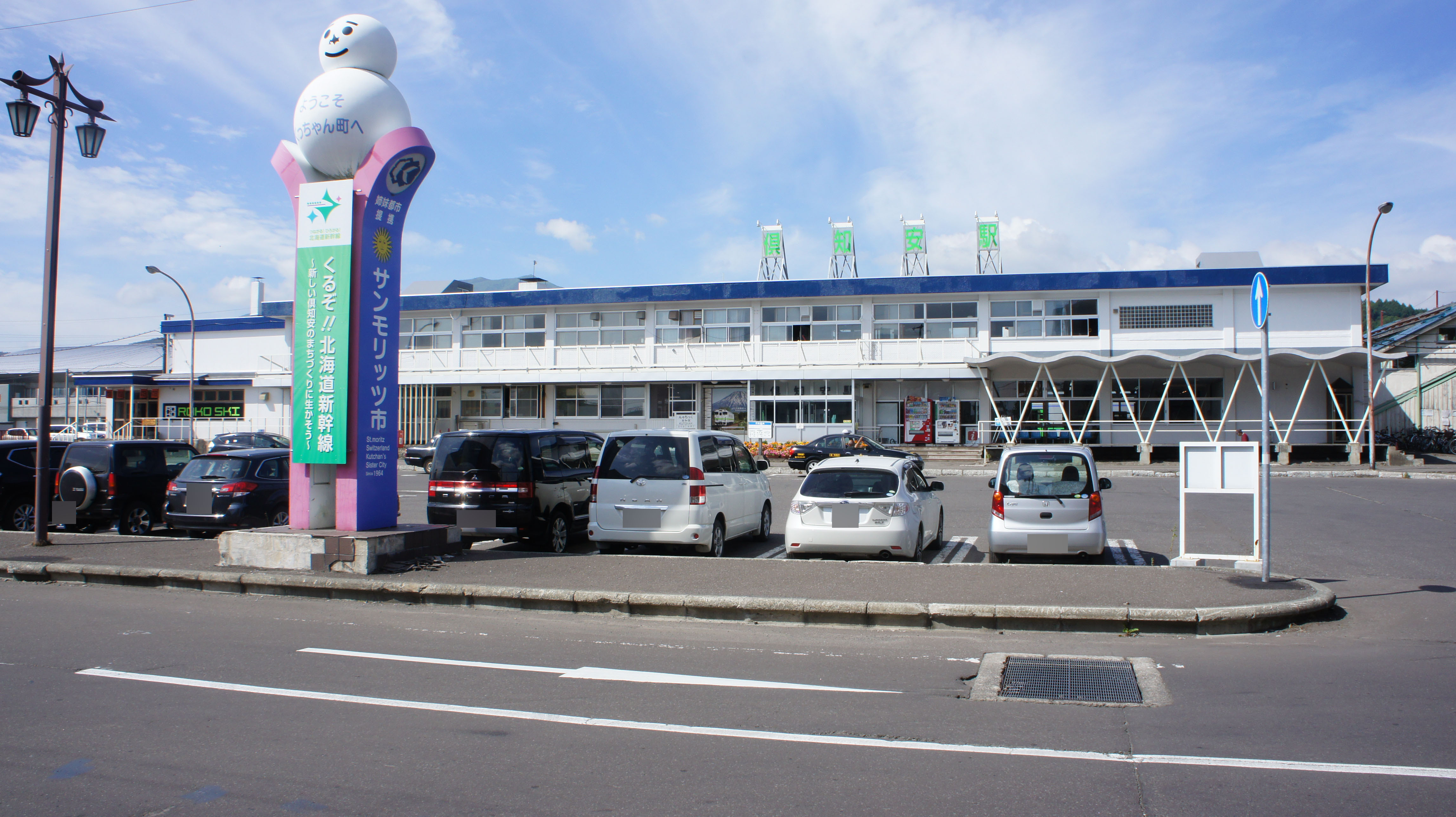 JR函館本線・倶知安駅の駅舎 Sony NEX-3